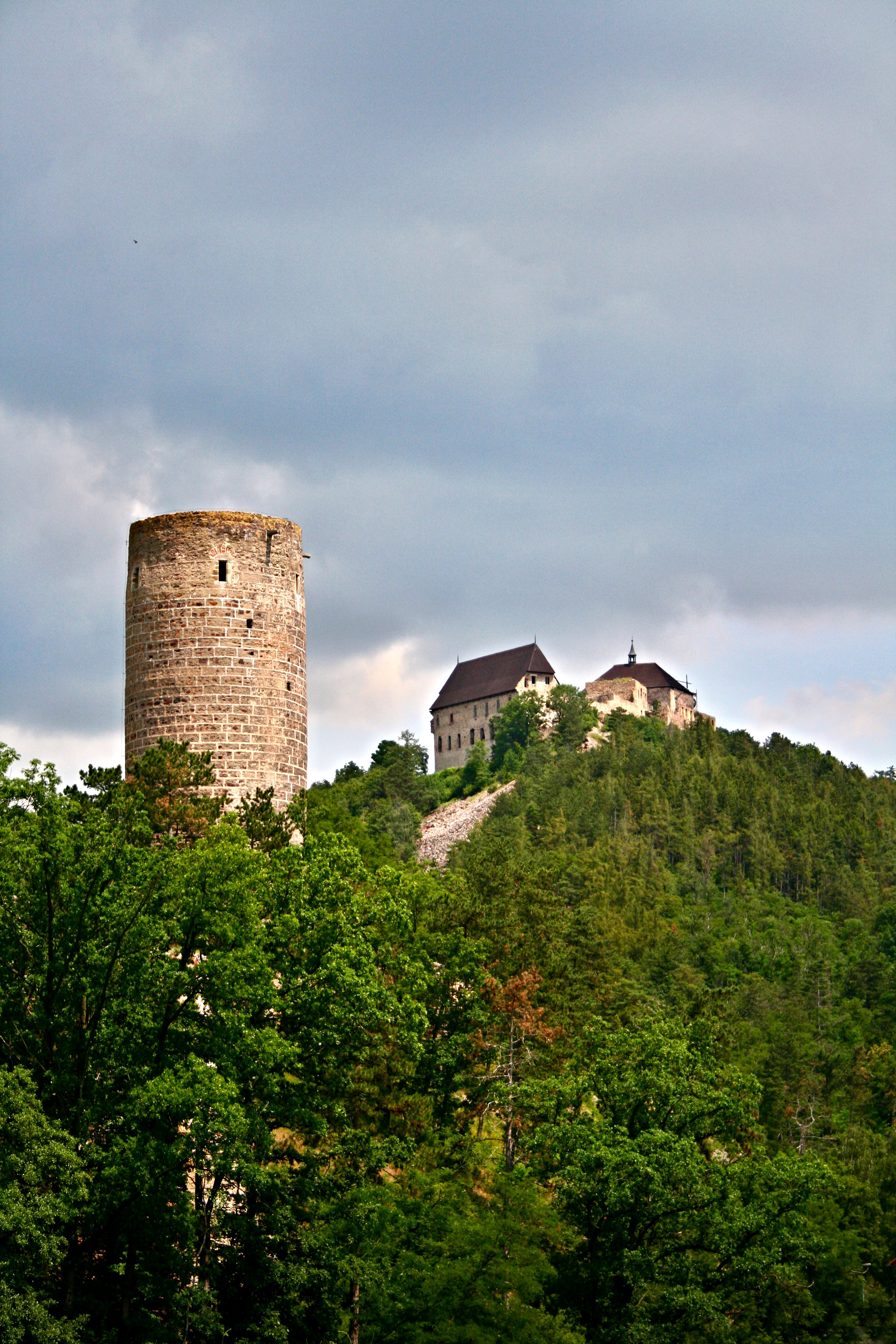 Hrad Točník, Točník 10, Točník.